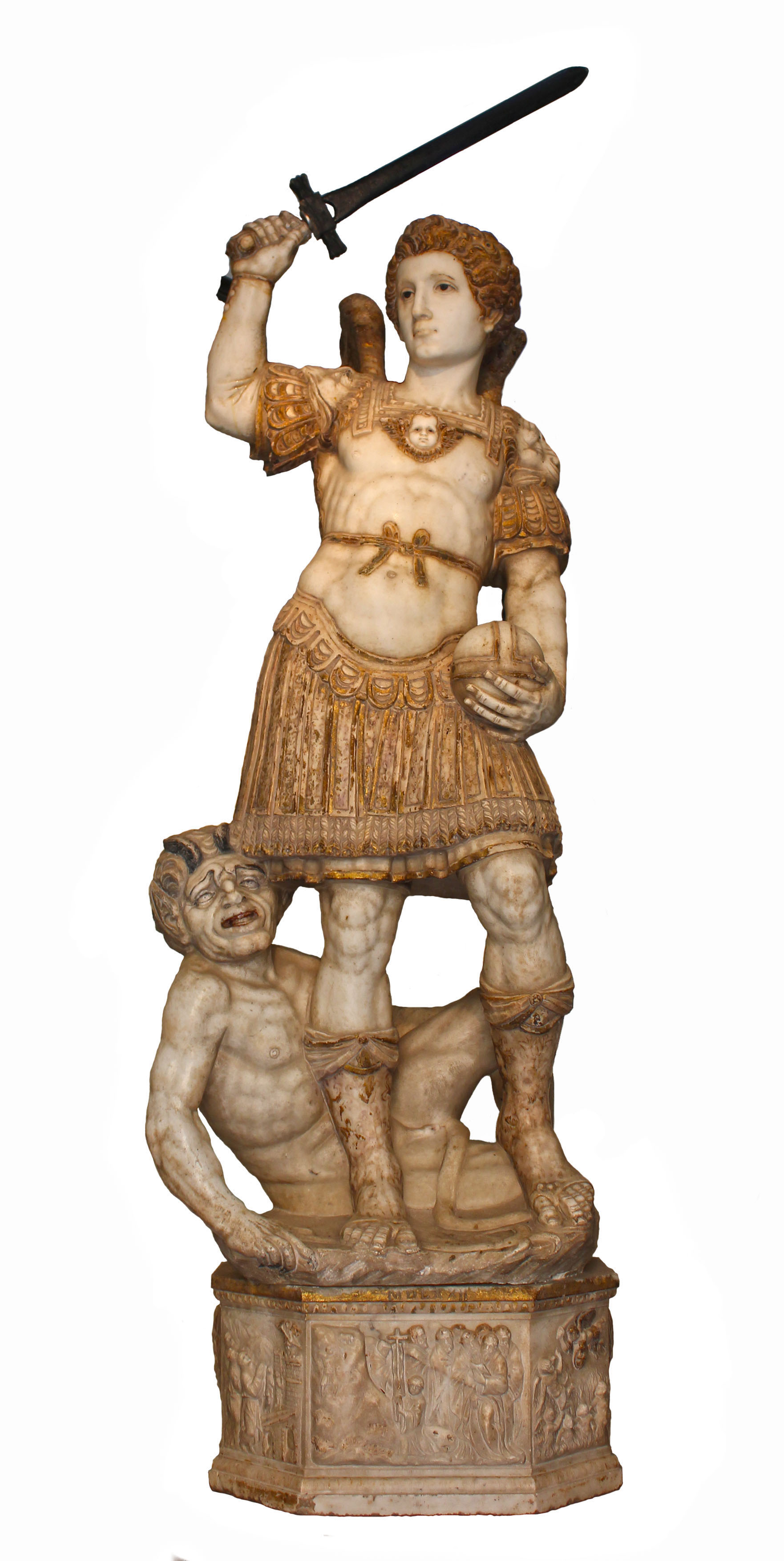 Statua San Michele 1572, A.Calamech, Castello-Santuario, Santa Lucia del Mela